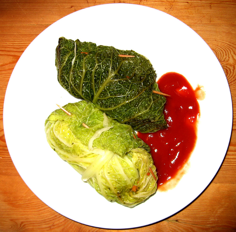 cabbage rolls